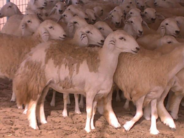 اناث حرية بالغة